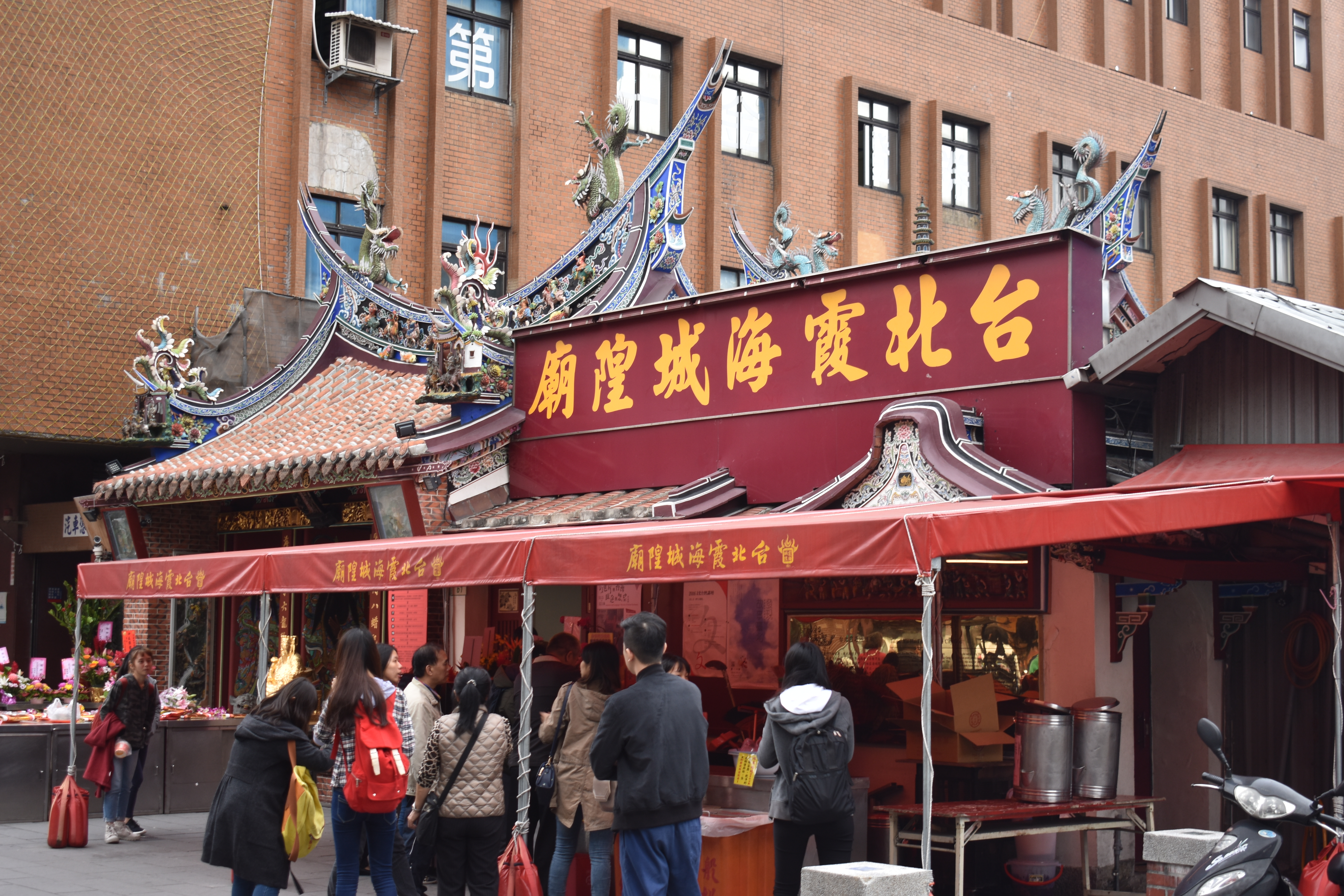 中文（台灣）: 台北霞海城隍廟